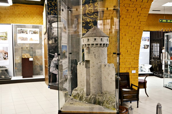 Макет середньовічного замка в Музеї історії туалету в Києві